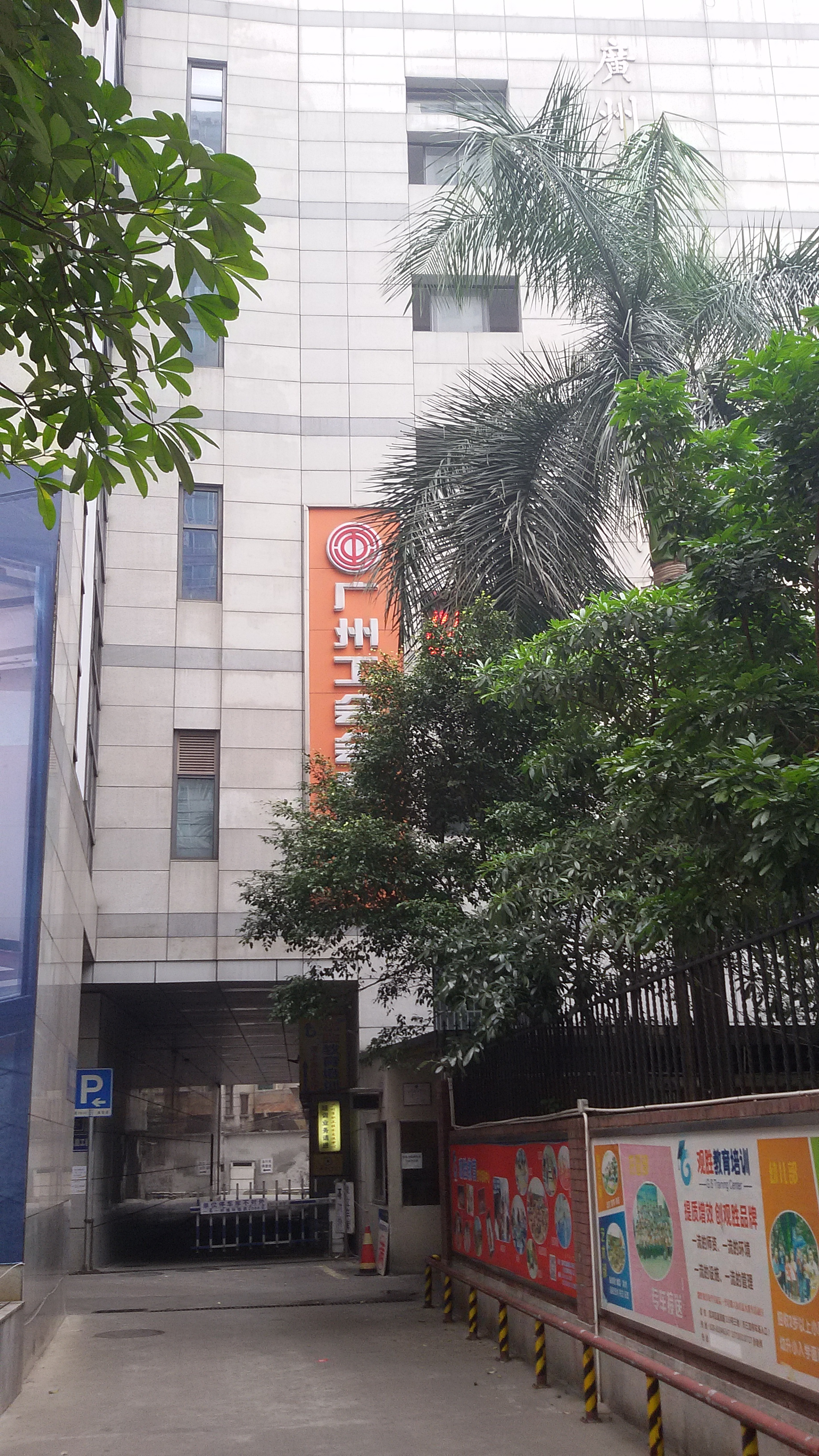 粵語: 廣州市第三工人文化宮